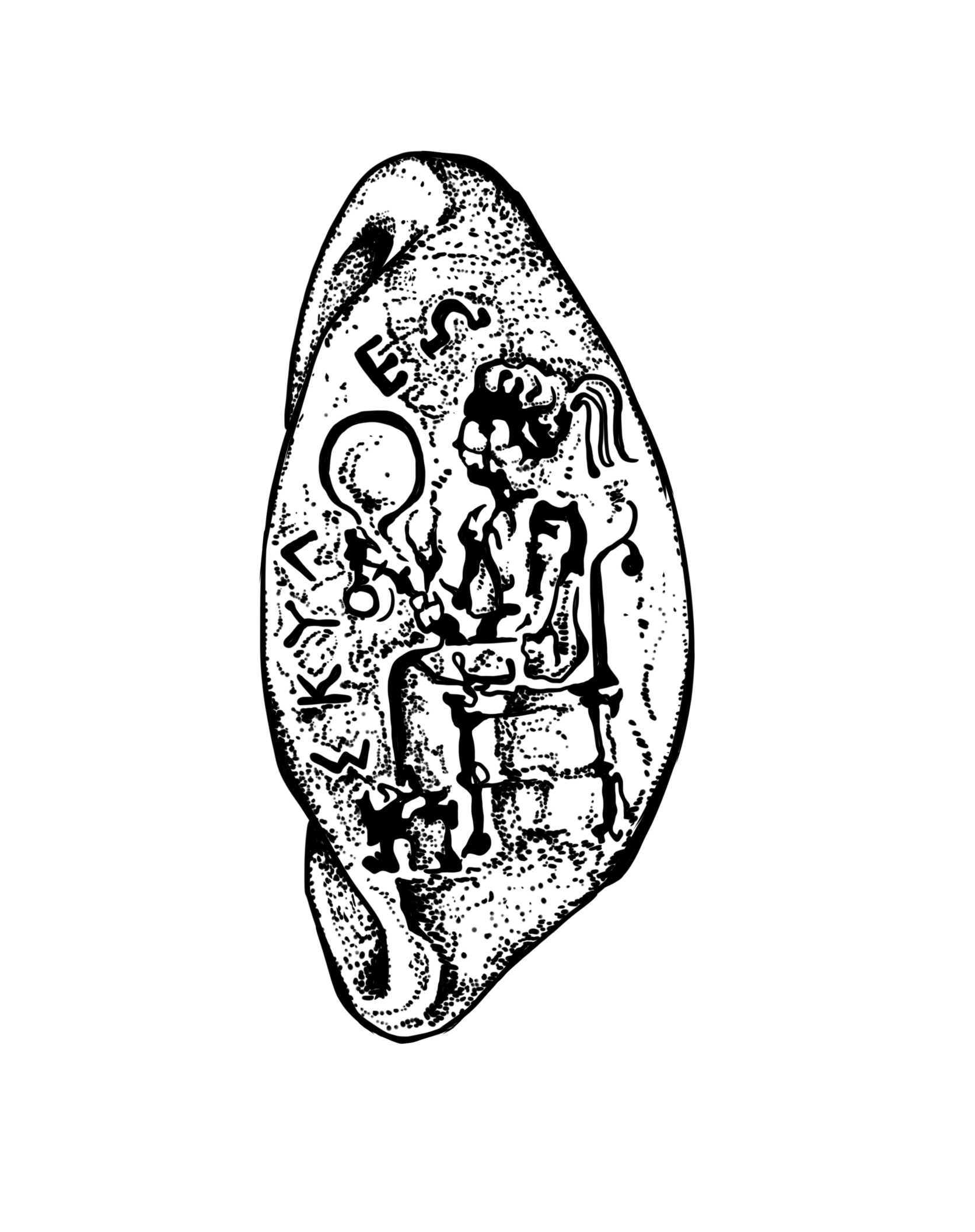 Древний золотой перстень, найденный в румынской Добрудже (регион между низовьями Дуная и Чёрным морем), материальное доказательство бегства скифского царя во Фракию. Кольцо найдено при вспашке поля и относится к середине V в. до н. э.